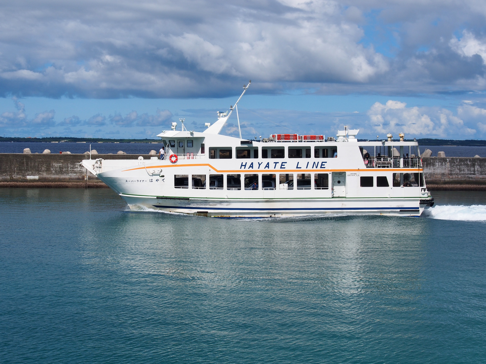 スーパーライナーはやて（はやて海運）